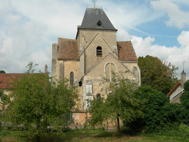 Eglise Médiévale de St Verain